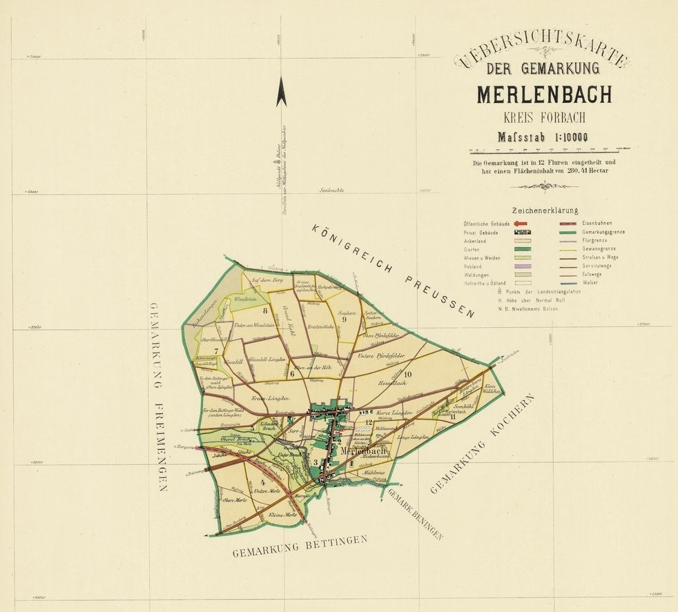 Plans cadastraux -- France -- Merlebach (Moselle). Cadastre établi en 1818, revu en 1893.